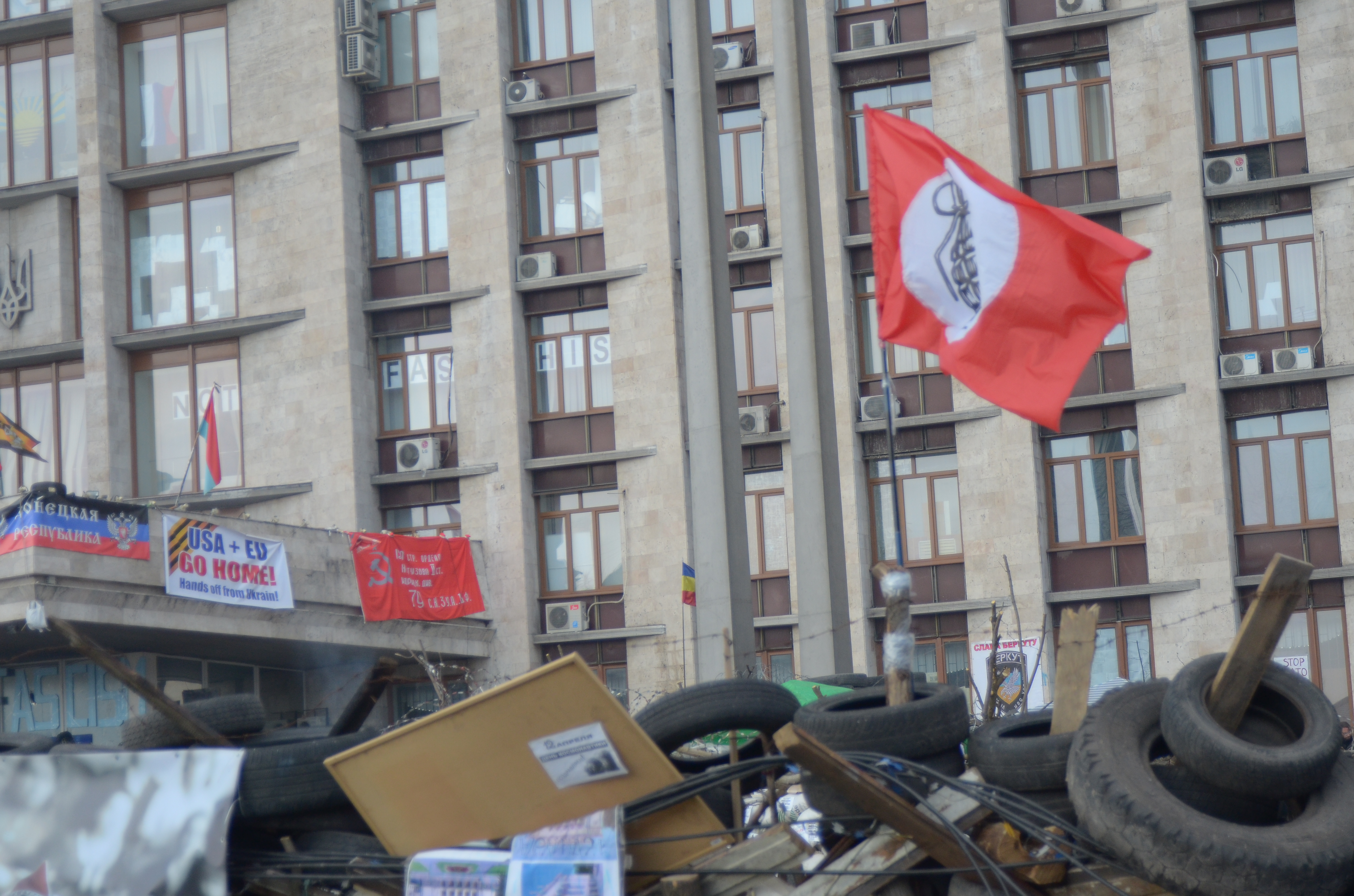 Протесты в Донецке